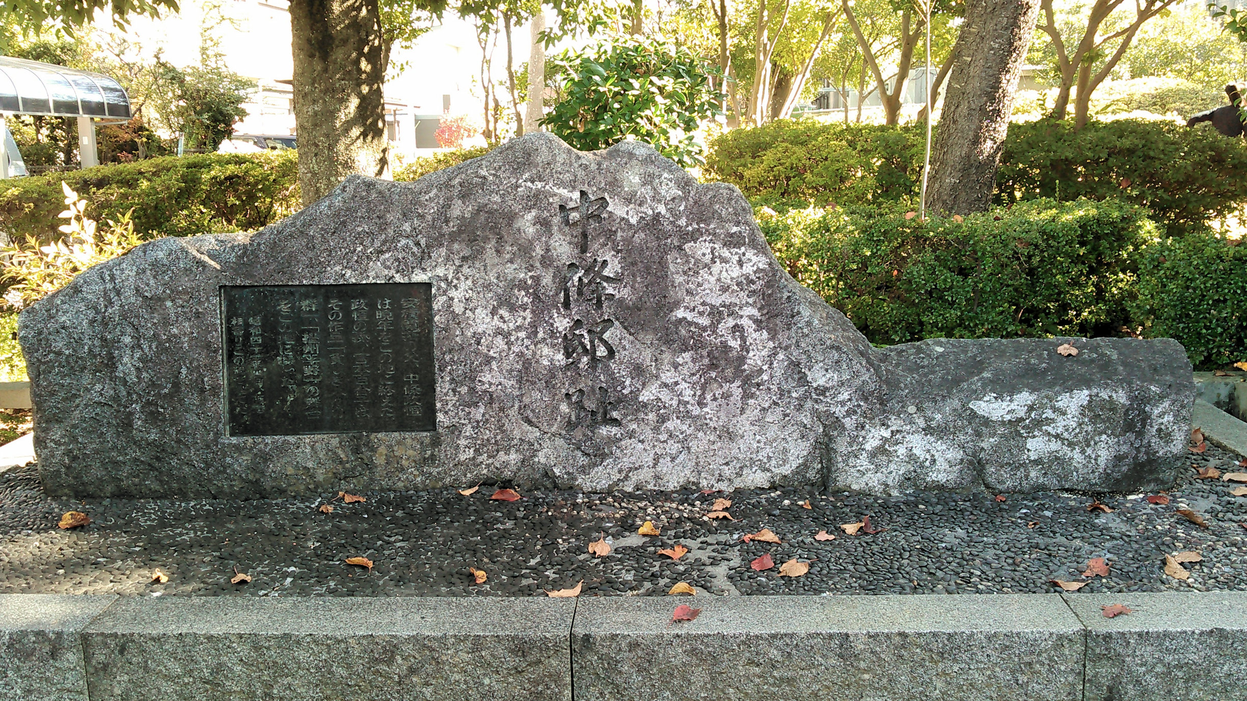 郡山市の開成緑地 中條政恒邸跡